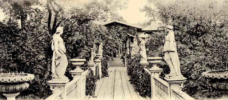 Сад Маразлі: дача Григорія Григоровича Маразлі в Одесі на Французькому бульварі 85